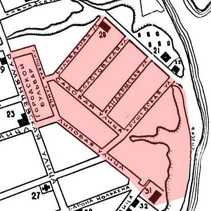 Тэрыторыя гомельскага "Свістка" (выкарыстаны план 1910 г.).